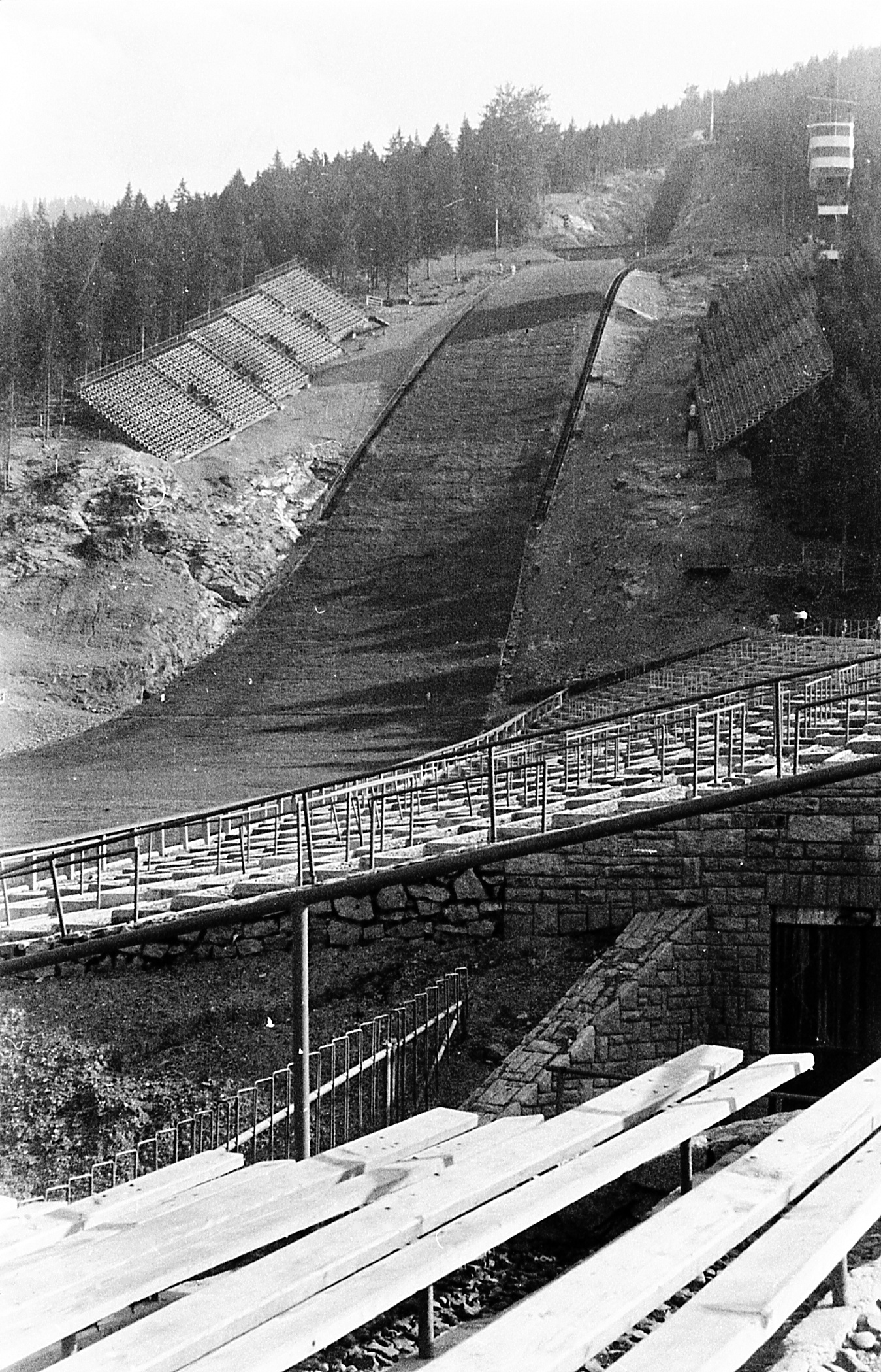 Skocznia narciarska Wielka Krokiew w Zakopanem. Pierwsza połowa lat 60. XX wieku